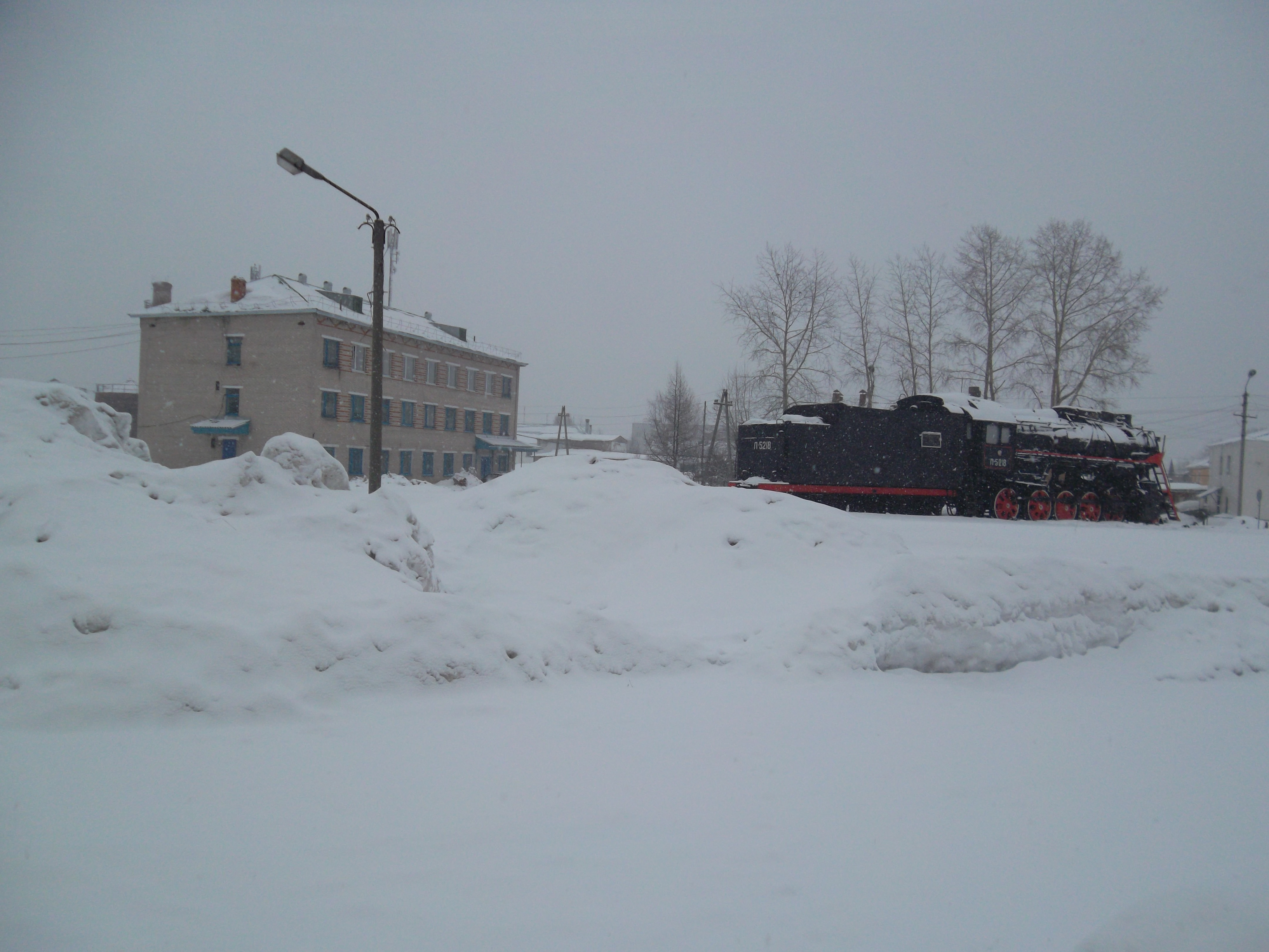 Паровоз в Микуни близ ж/д.